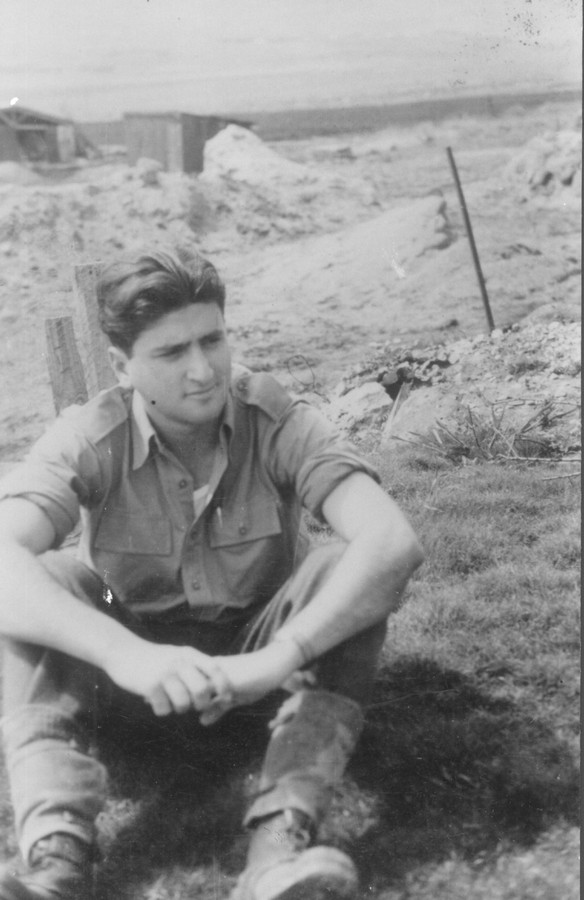 חטיבת יפתח - הגדוד השלישי - הכשרות - 8 - הכשרת כפר-גלעדי - מנוחת העמל. רם גופנא (קפלן)